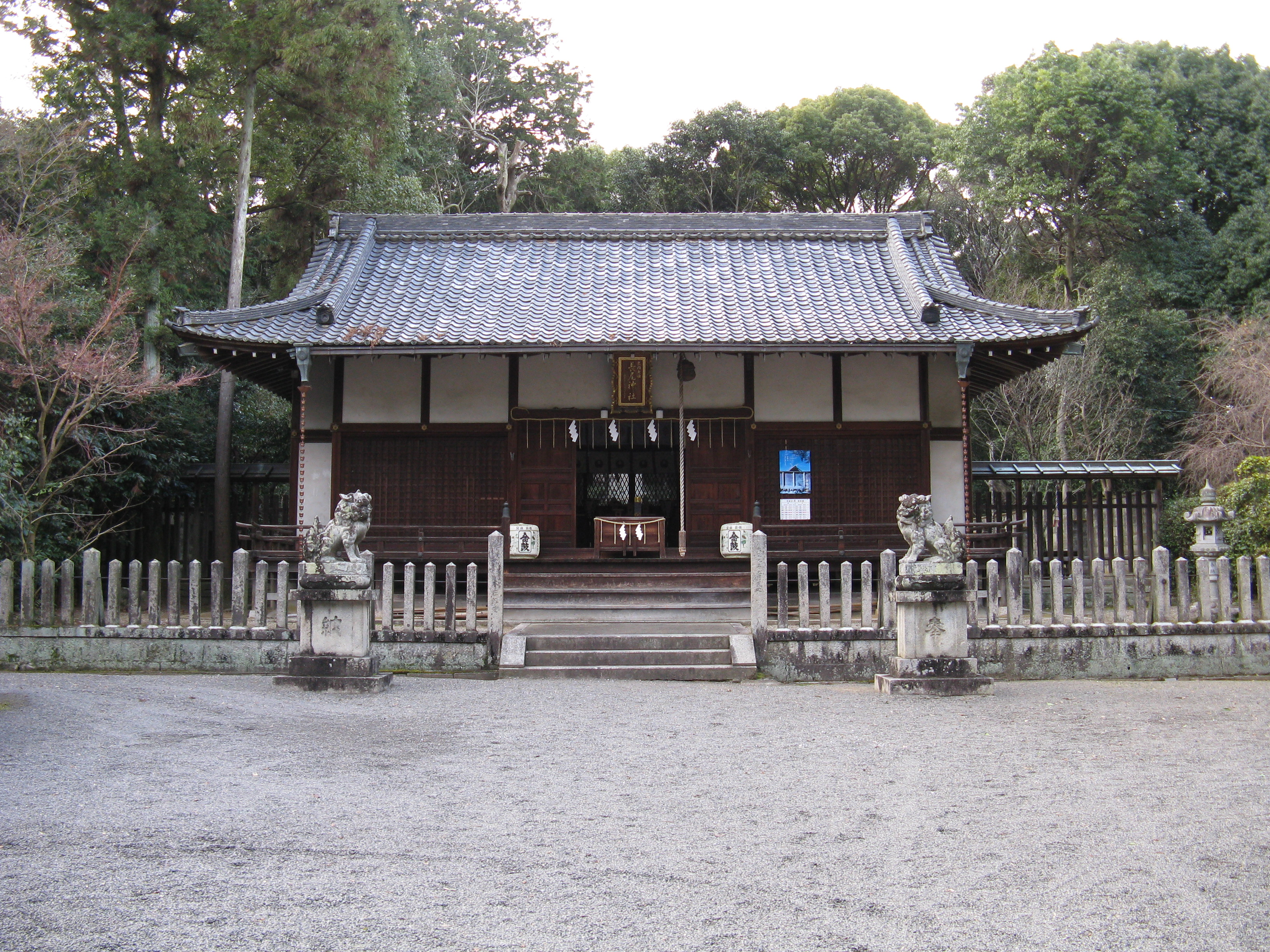 長尾神社 拝殿